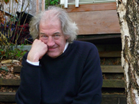 Alexandre Chemetoff